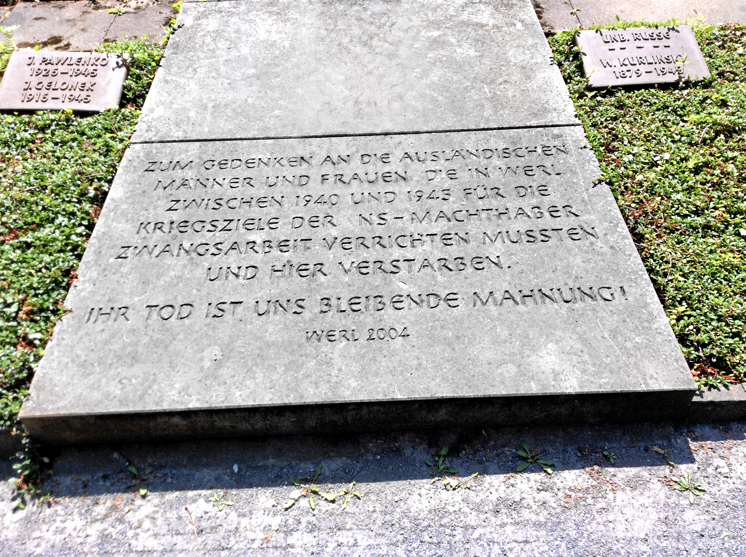 Parkfriedhof Werl, Gedenkstein für während des 2. Weltkrieges gestorbenen Zwangsarbeiter